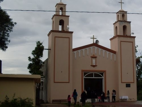 Capilla de La Virgen De Guadalupe, Ucacuaro, Ecuandureo, Michoacan